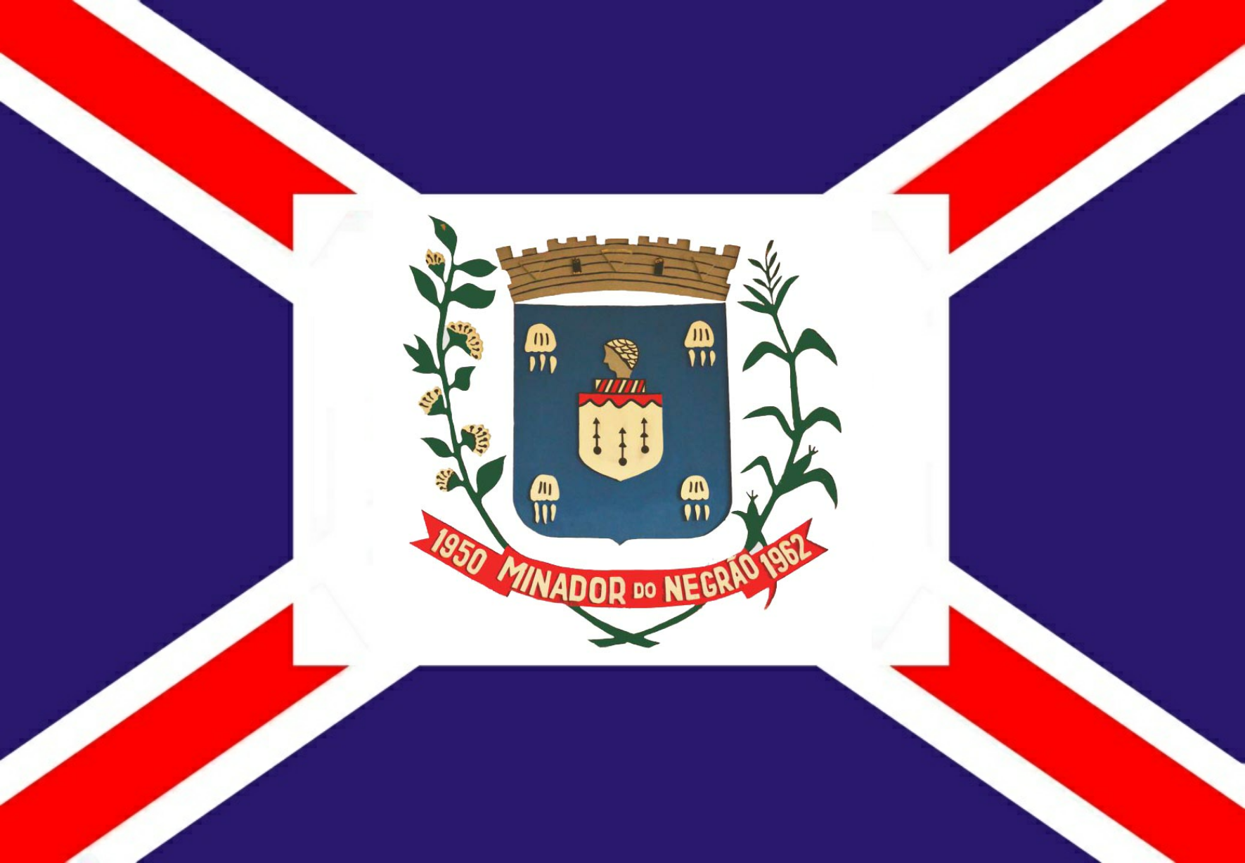 Bandeira de Minador do Negrão